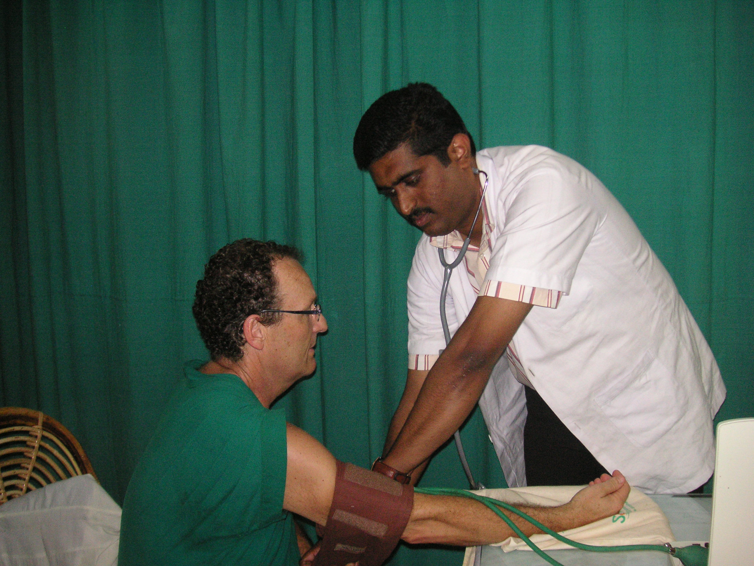 Ayurvedaarzt beim täglichen Blutdruck und Pulsmessen während der Kur im Hospital Somatheeram Kerala Indien